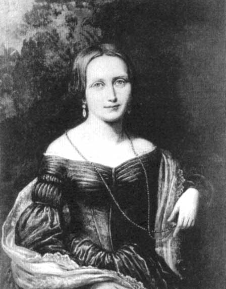 Painting